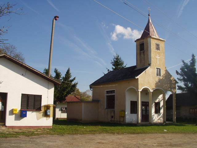 centar sela Vrbovecka Poljana